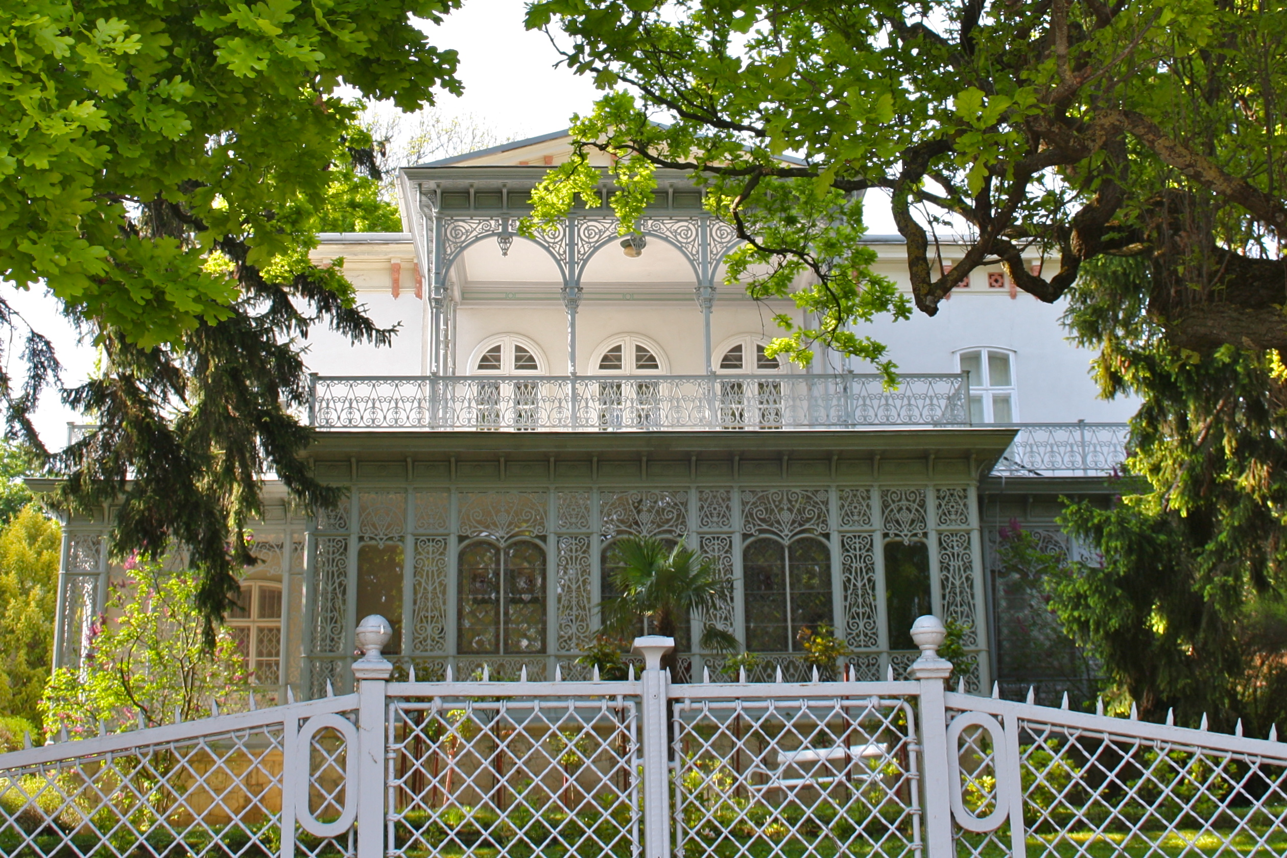 Villa Strecker, Wohnsitz des Komponisten Heinrich Strecker, in Baden, Niederösterreich.